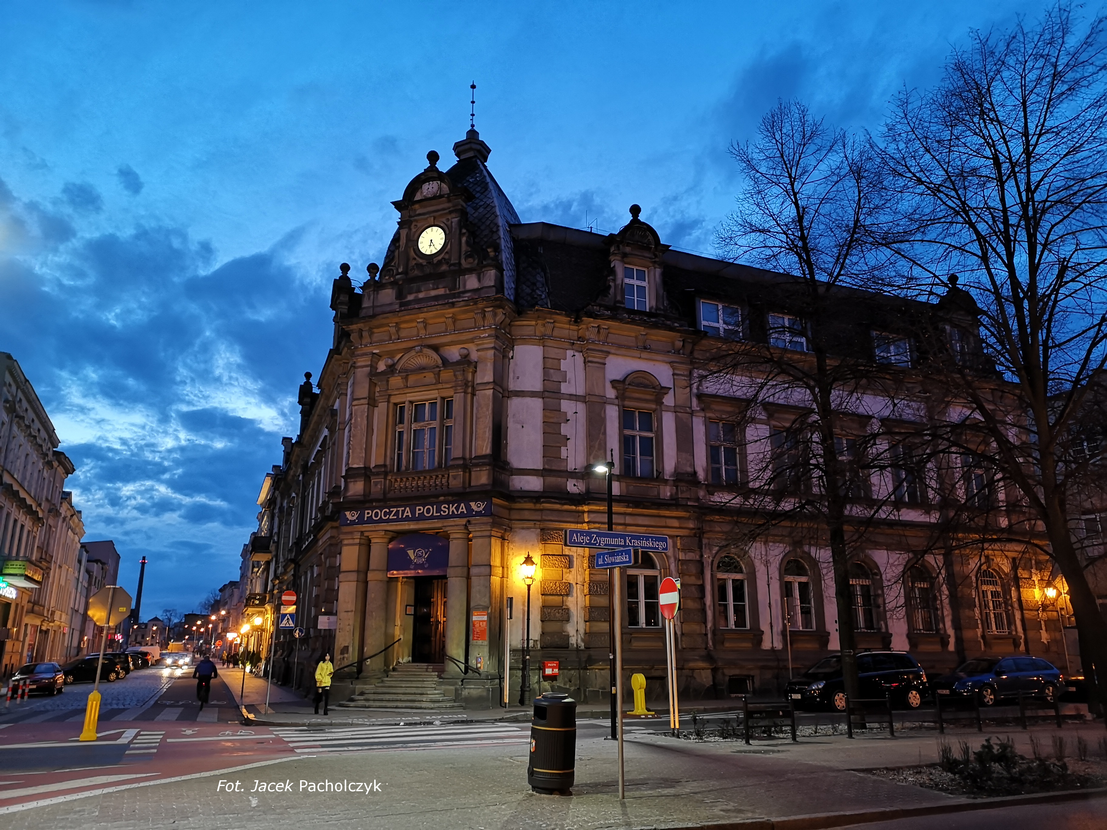 Budynek Poczty Polskiej przy zbiegu ul. Słowiańska i Al. Krasińskiego w Lesznie. Siedziba główna w Lesznie - widok o zmierzchu.